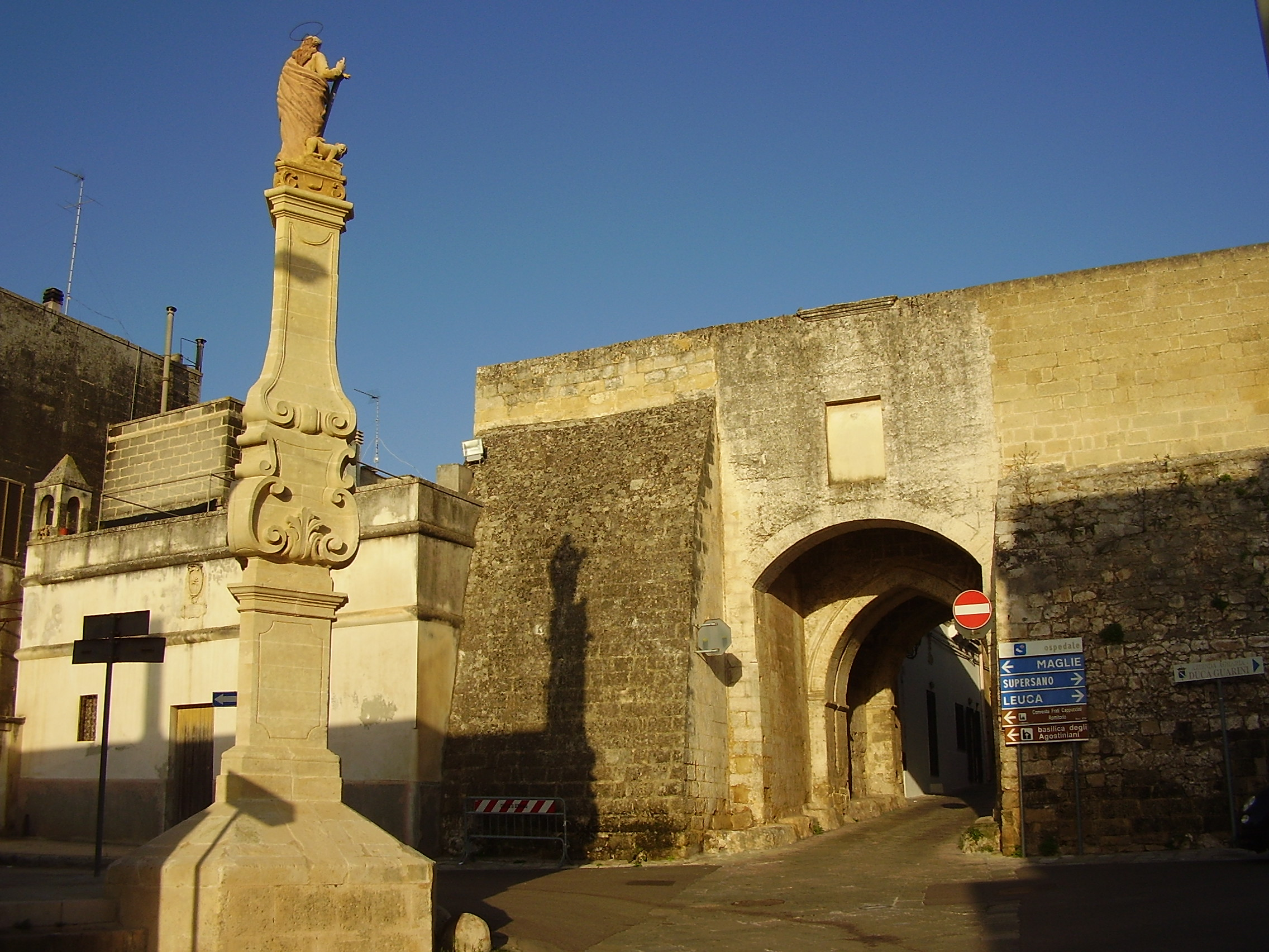 Arco di Porta Terra Scorrano, Lecce